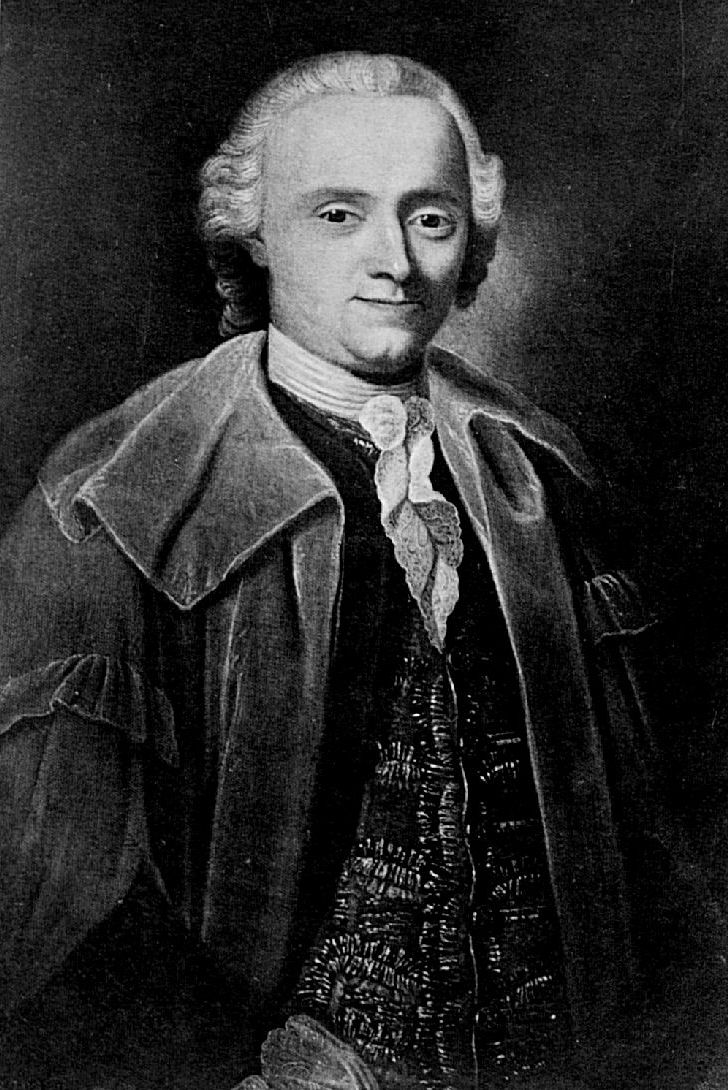 Johann Georg Roederer